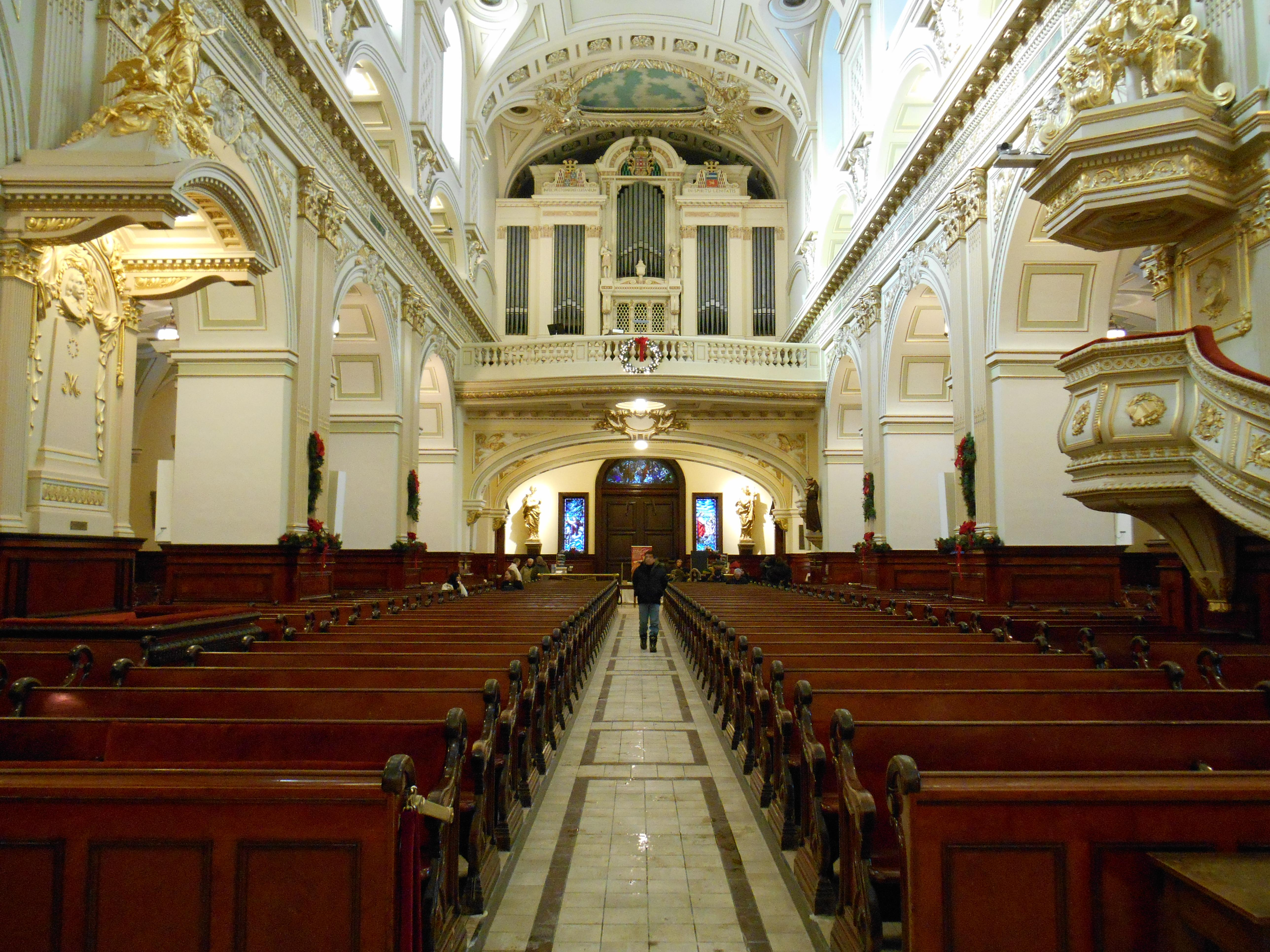 Basilique-cathédrale Notre-Dame de Québec